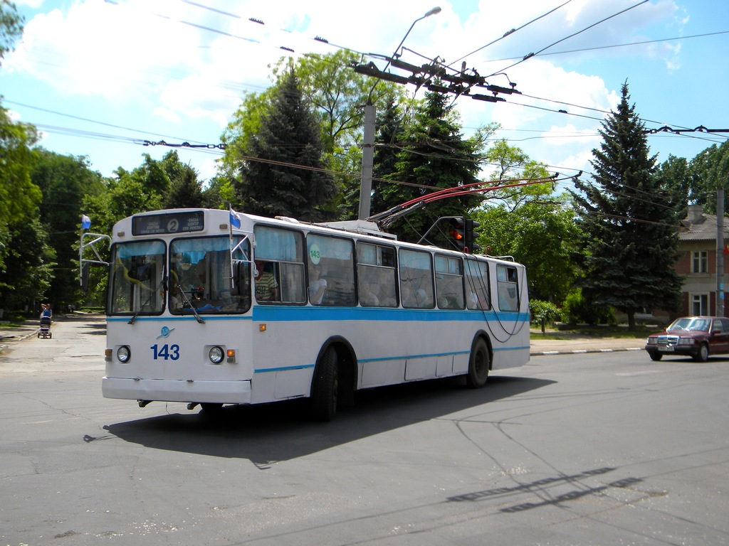 Троллейбус ZiU(Trolza)-682Г00 - 143 на перекрестке улиц Штефан чел Маре и Первомайской